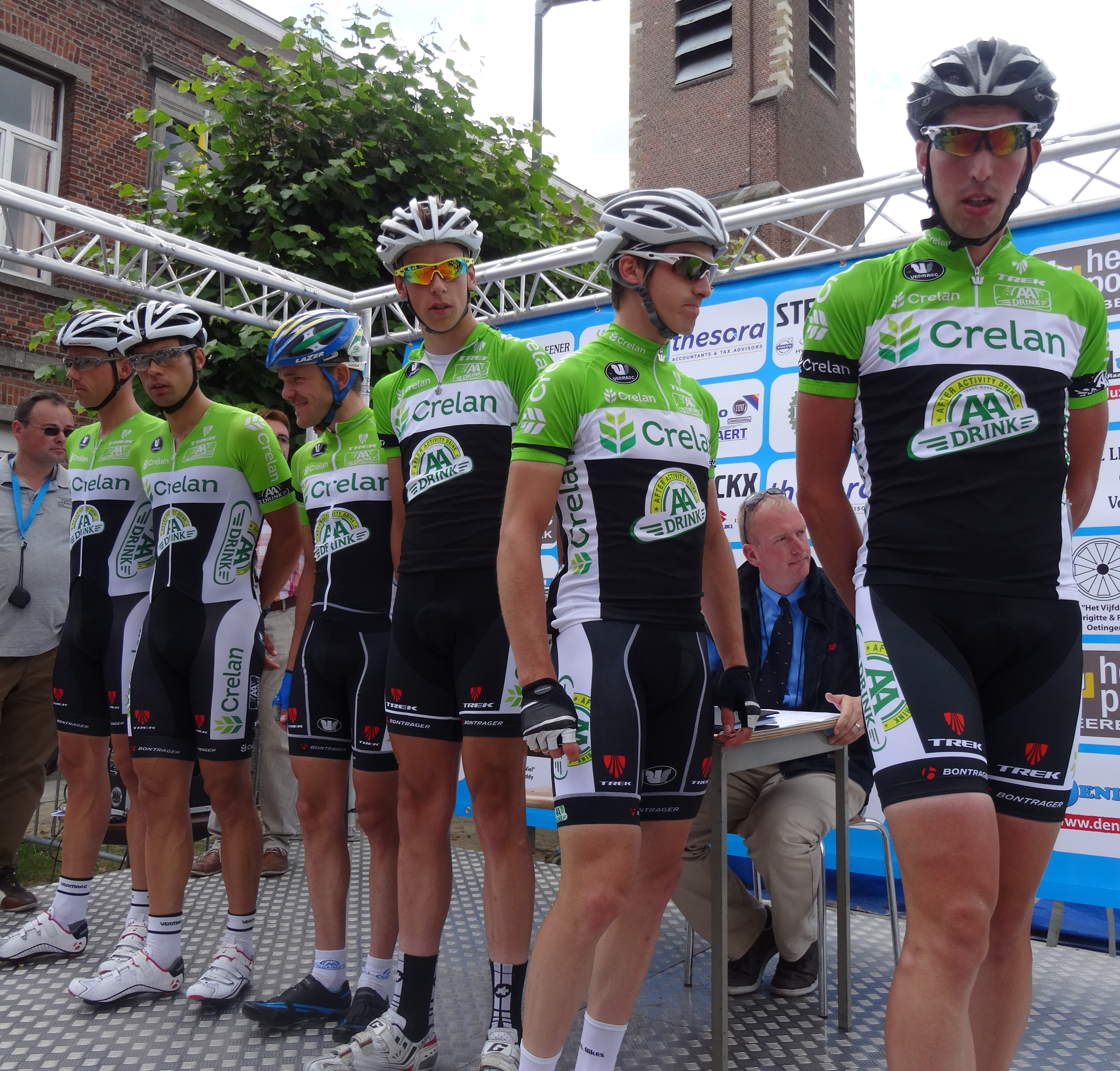 Reportage photographique réalisé le mercredi 25 juin à l'occasion du départ et de l'arrivée de l'Internationale Wielertrofee Jong Maar Moedig 2014 à Oetingen (Gooik), Belgique.